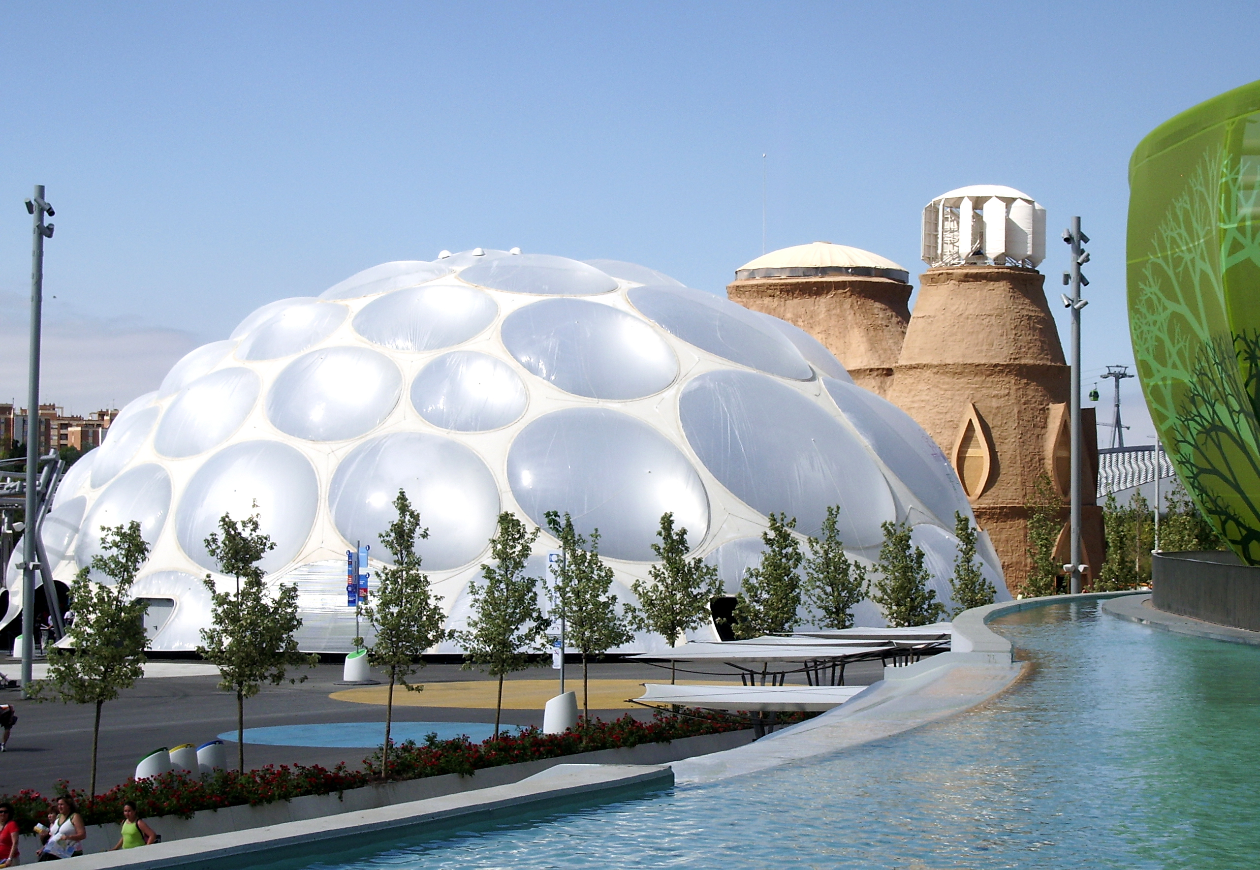 Vista de la zona de las Plazas temáticas de la Exposición Internacional de Zaragoza 2008. A la izquierda el pabellón "Sed"; a su derecha, más al fondo, el pabellón de las iniciativas ciudadanas, conocido popularmente como "El Botijo".